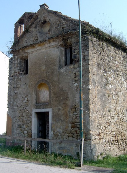 Chiesa di S. Domenico in Apollosa (BN) - località Taverna presso la via Appia.